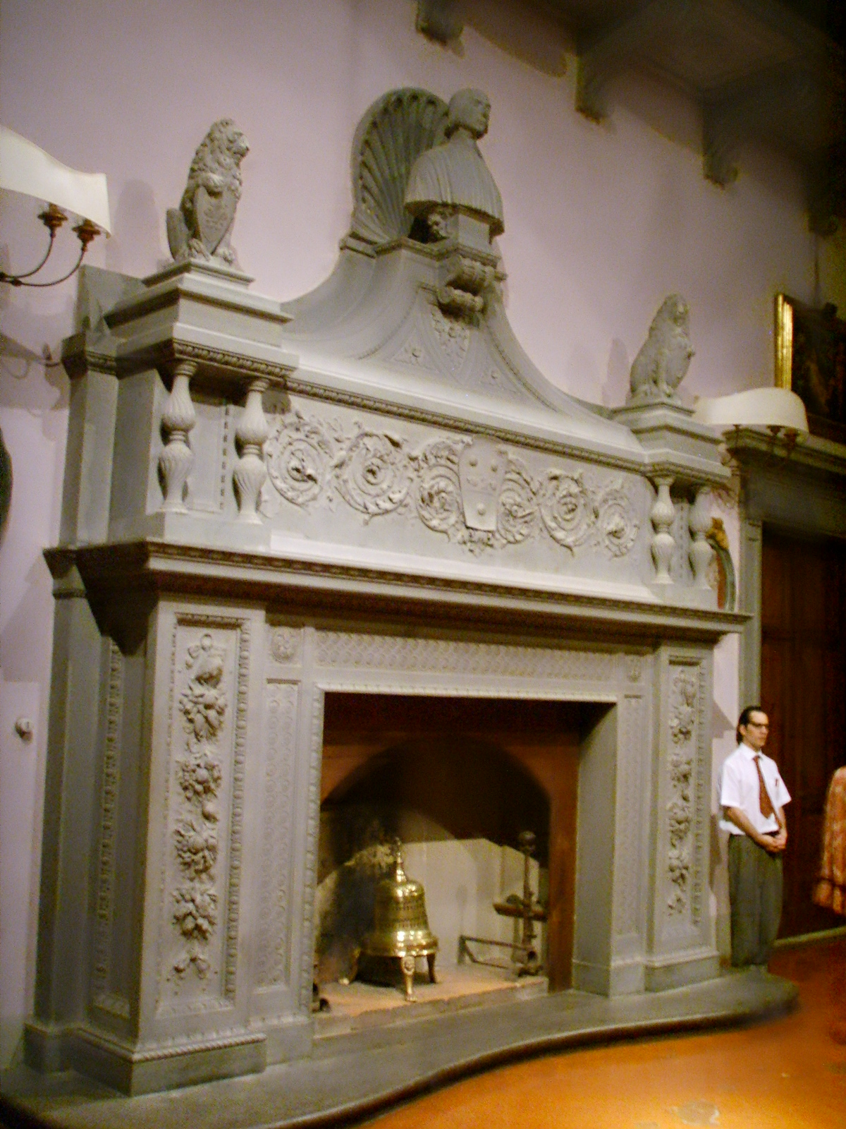 Villa di maiano, salone, camino monumentale